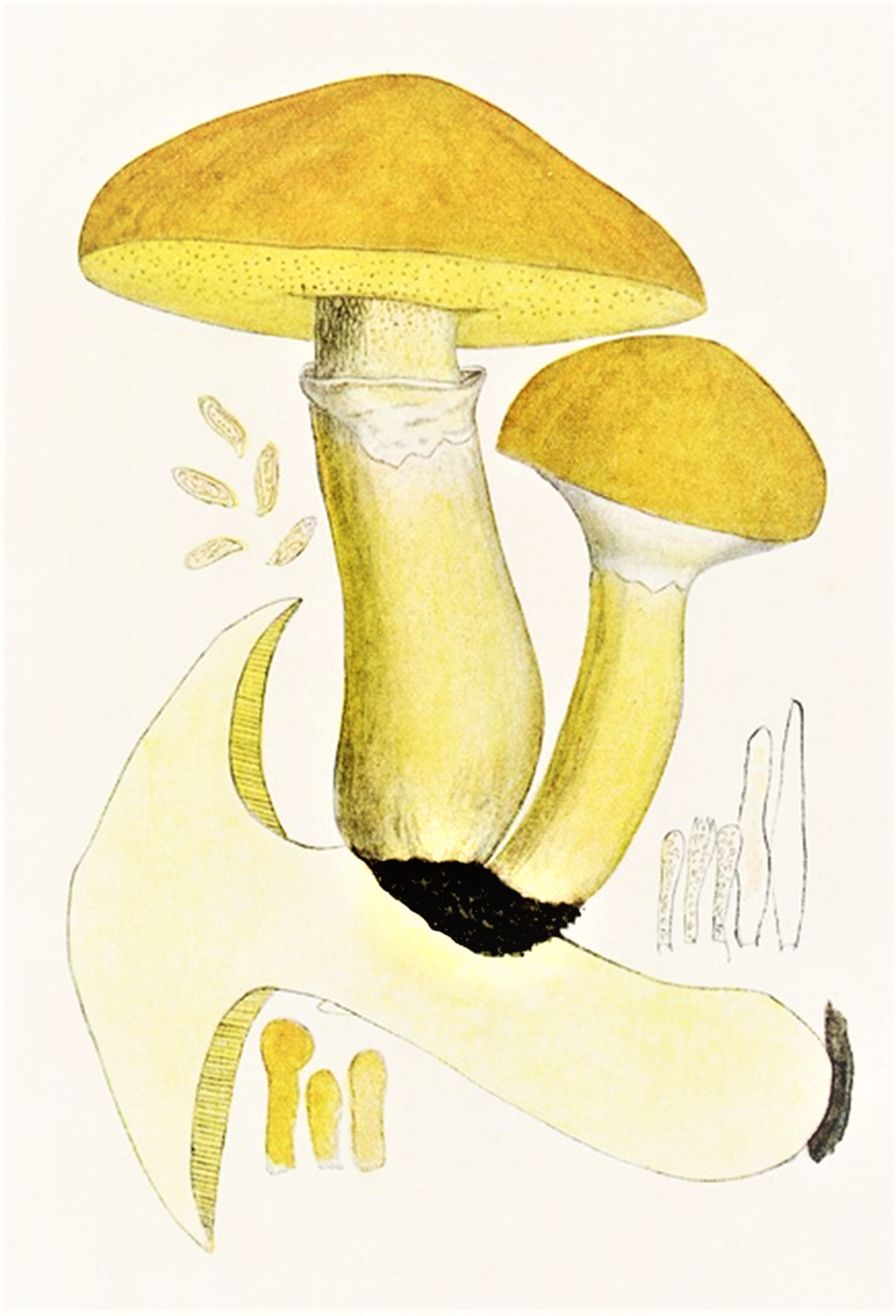 Giacomo Bresadola: Boletus elegans Schumach. (1803), heute Suillus grevillei (Klotzsch, 1832) Singer, (1945)